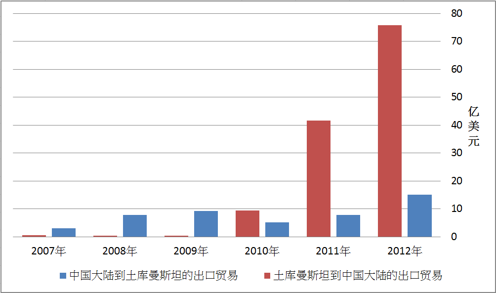 中文（香港）: 中國大陸與土庫曼斯坦的貿易